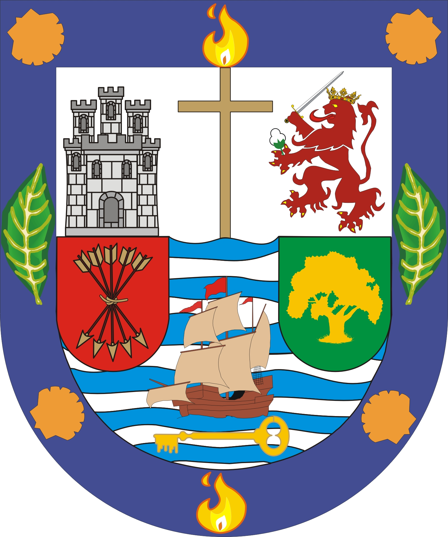 La formula heráldica del escudo es la siguiente: Mandásenos por sello a la dicha Provincia de Caráquez y Antiguo Gobierno indio de Carán por merced del Señor Virrey de Lima que fue de estos Reinos el Conde de Nieva y por lo consiguiente habiéndosele otorgado a título de Alcaldía Mayor de Reales Bodegas que depende del dicho Corregimiento de Quito y su jurisdicción, por dote del Doctor Don Antonio de Morga, Presidente de la Audiencia Real que en aquella ciudad reside, dispongose por armas un escudo de plata, ceñidos tuviese adentro de sí, dos más allí subyugados; en la siniestra de sinople un árbol de ceibo, todo robusto de oro y la diestra de gules un manojo de cinco Flechas de oro puestas en nudo. Encimada a cada orbe, la primera un león rampante colorado, uñado de oro y Coronado de Reyes que sostiene al mediodía una flor de algodón y al septentrión una espada de plata empuñada en oro; en la segunda, un castillo de piedra almenado con puerta y siete ventanas mazonadas de sable. Y postrada una cruz de castaño filada de sable, sedimentada a un estuario ondeado de aguas hacia una bahía abierta en orden de cielo y plata diferenciadas cada una, inclusive a su término la culminante fuere como la inicial y sobre la mar un Galeón, anclado en viento, y debajo tenga una llave de oro, esculpida la conjetura de aspas. Y por orla de Azur estén cuatro veneras indianas de aurora acantonadas, en jefe dos piras ardiendo. Puntadas del levante bajo y poniente alto dos hojas del fruto del cacao. Con lo cual para el uso de los susodichos gobiernos tuviese para emblema de la dicha autoridad superior que le fuere representado, llevase como lema la frase IMPERIVM CARÁQUEZ FIDELIS AMICITIA REGIS HISPANIAE sostenida en ambos lados por dos picaflores asimismo coronados. Como yace aquí figurado y mencionado.